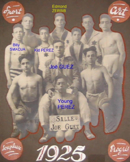 Membres de la salle Joe Guez